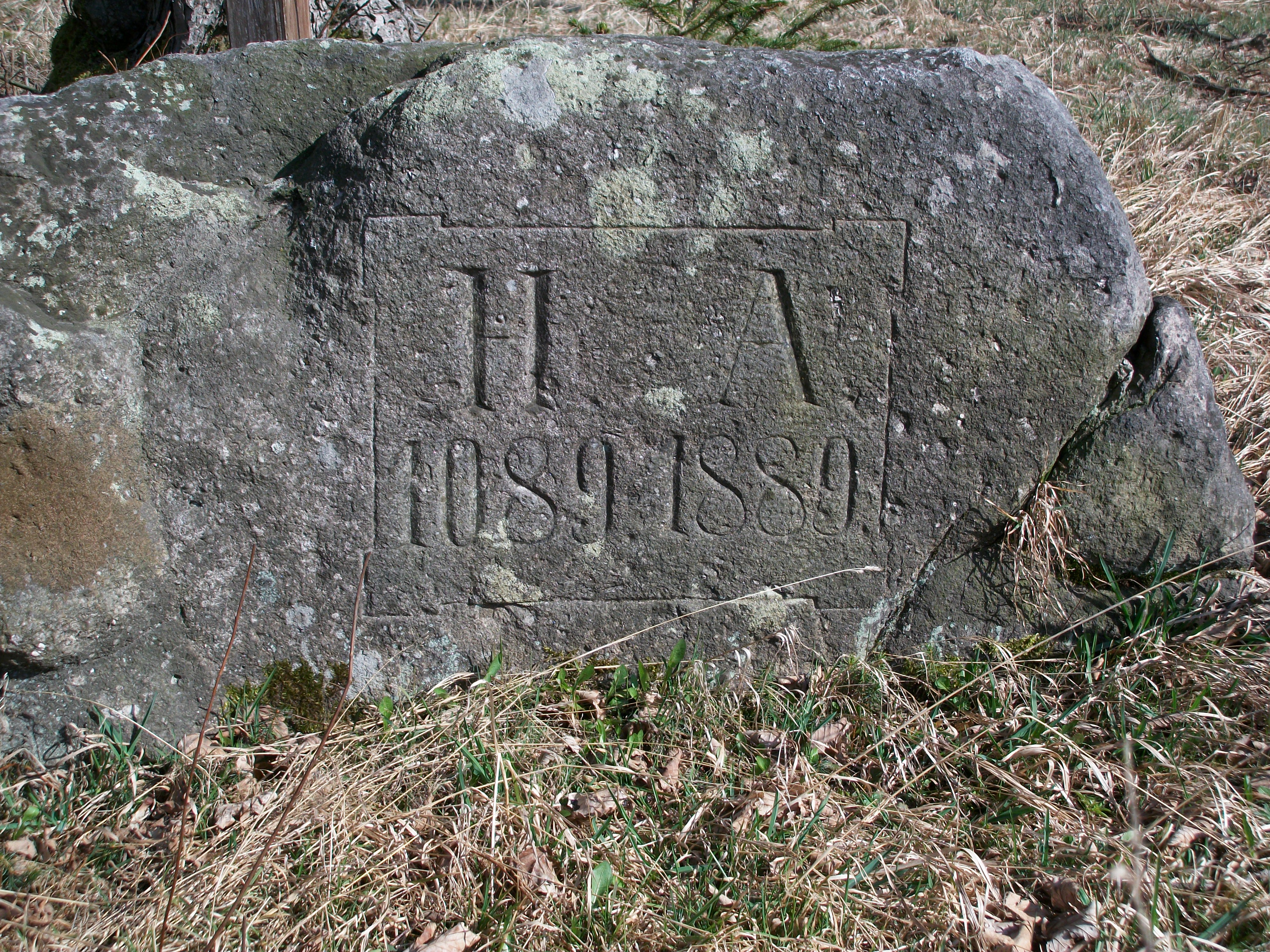 Jahnsgrün, Gemeinde Hartmannsdorf bei Kirchberg, Gedenkstein zur 800-Jahr-Feier des Hauses Wettin